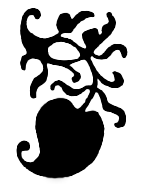 Feuille d'aldine tirée du Gros Canon Romain, gravé par Claude Garamond vers 1549.